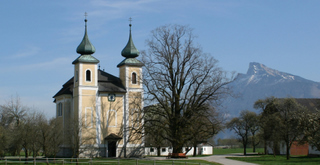 Laurentiuskirche Sankt Lorenz